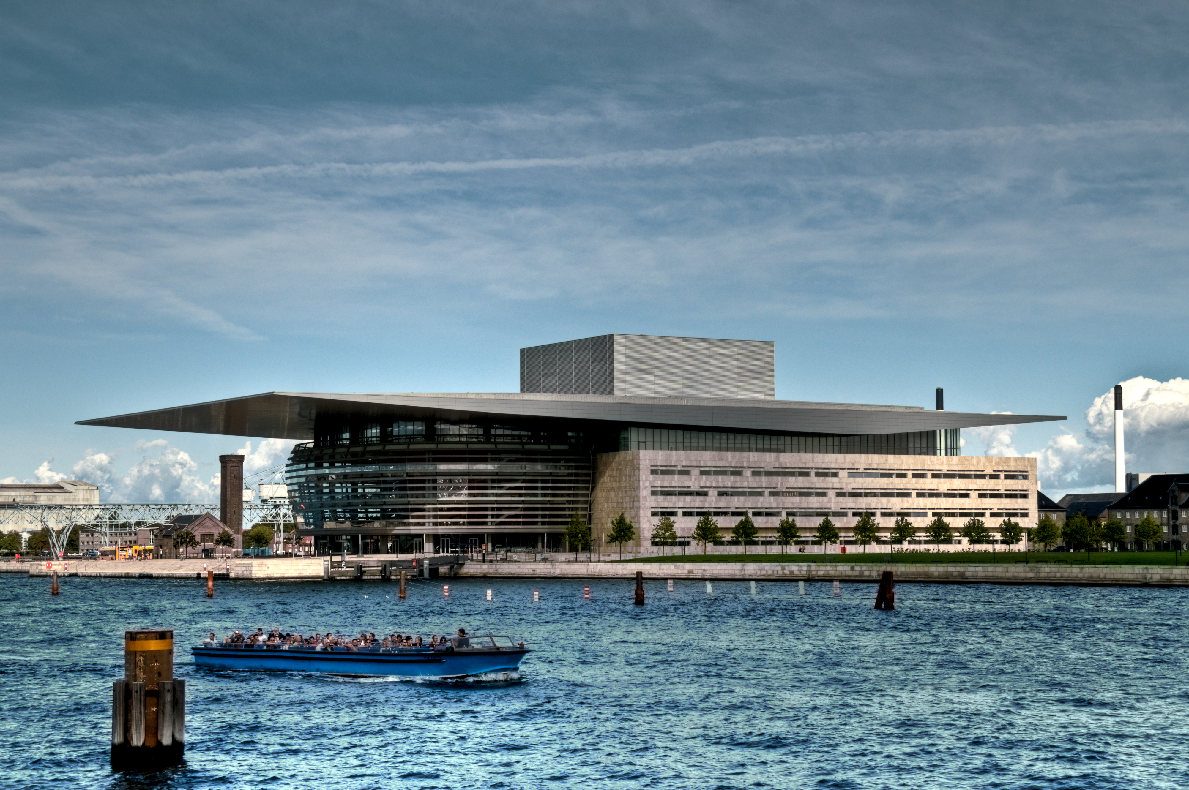 Copenhagen Opera House